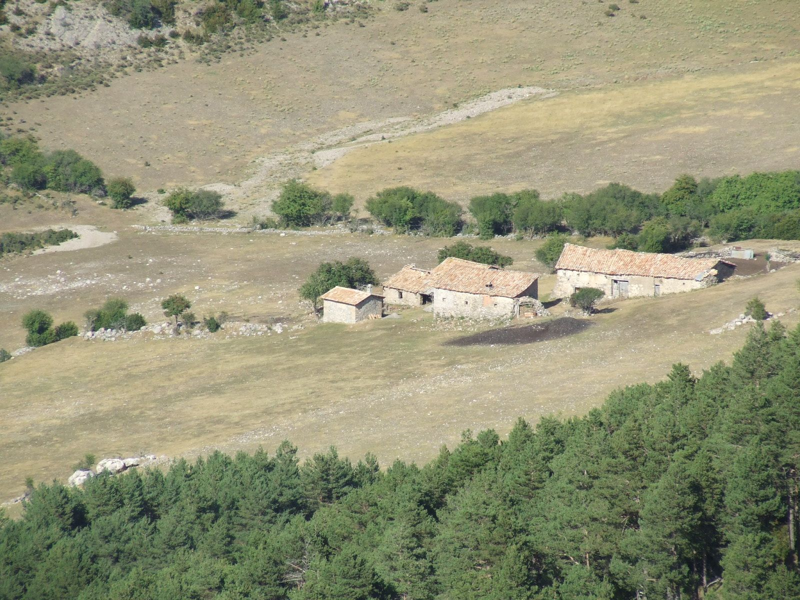 Bordes i pallisses centrals de la Coma d'Orient (Hortoneda de la Conca, Conca de Dalt, Pallars Jussà)